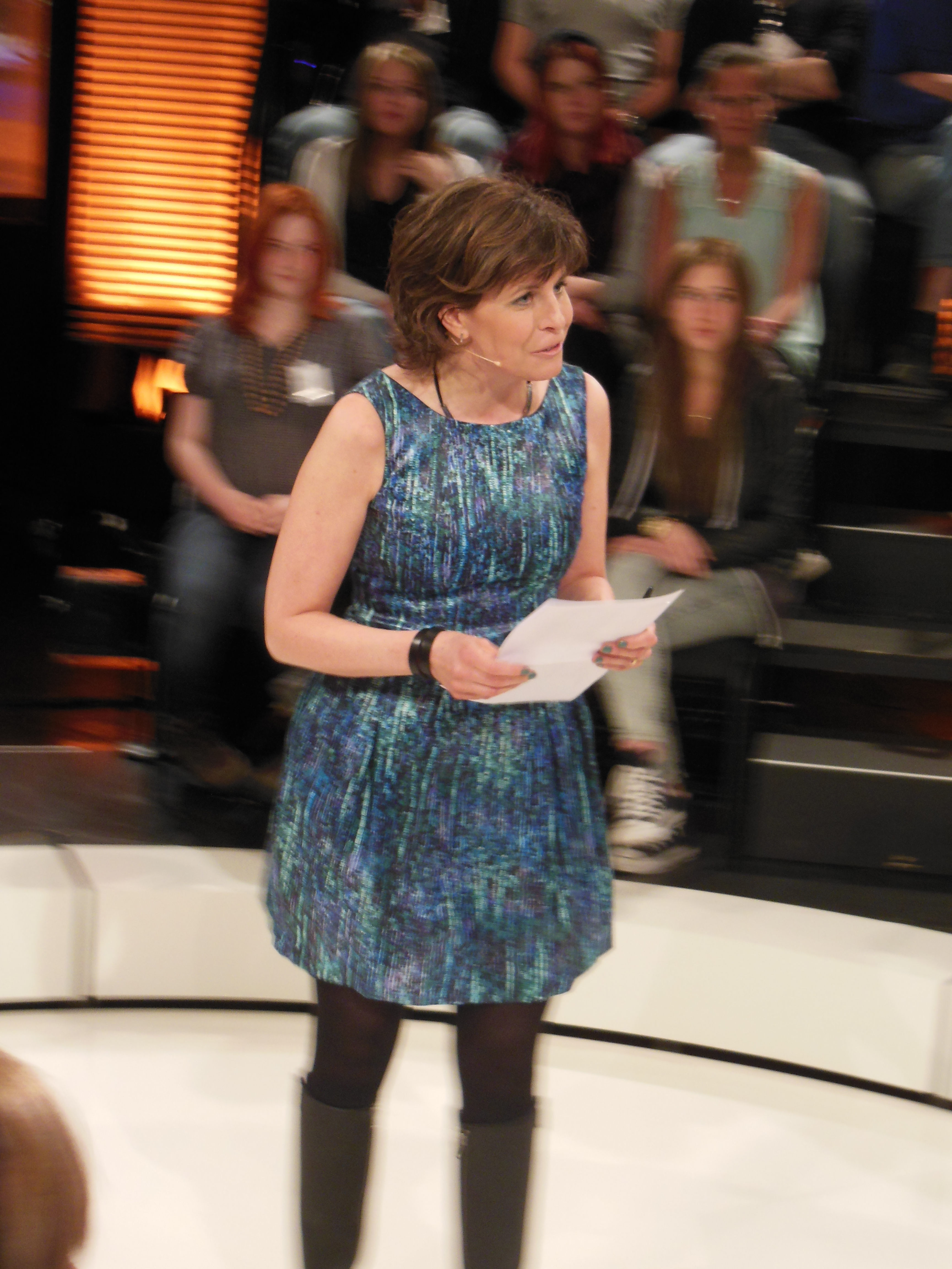 Kristina Hedberg inför sändningen av TV-programmet Debatt i SVT1 2 maj 2013.